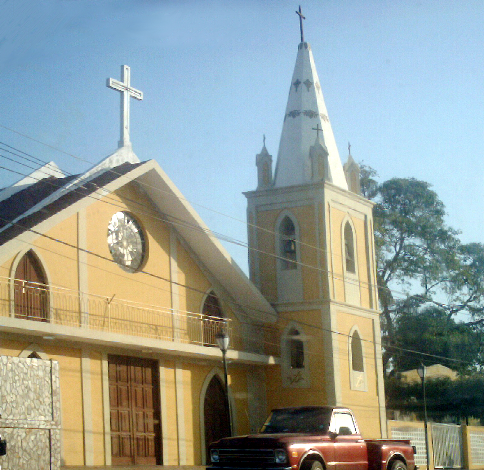 Iglesia de María Auxiliadora en Santa Cruz de Mara, Zulia, Venezuela.